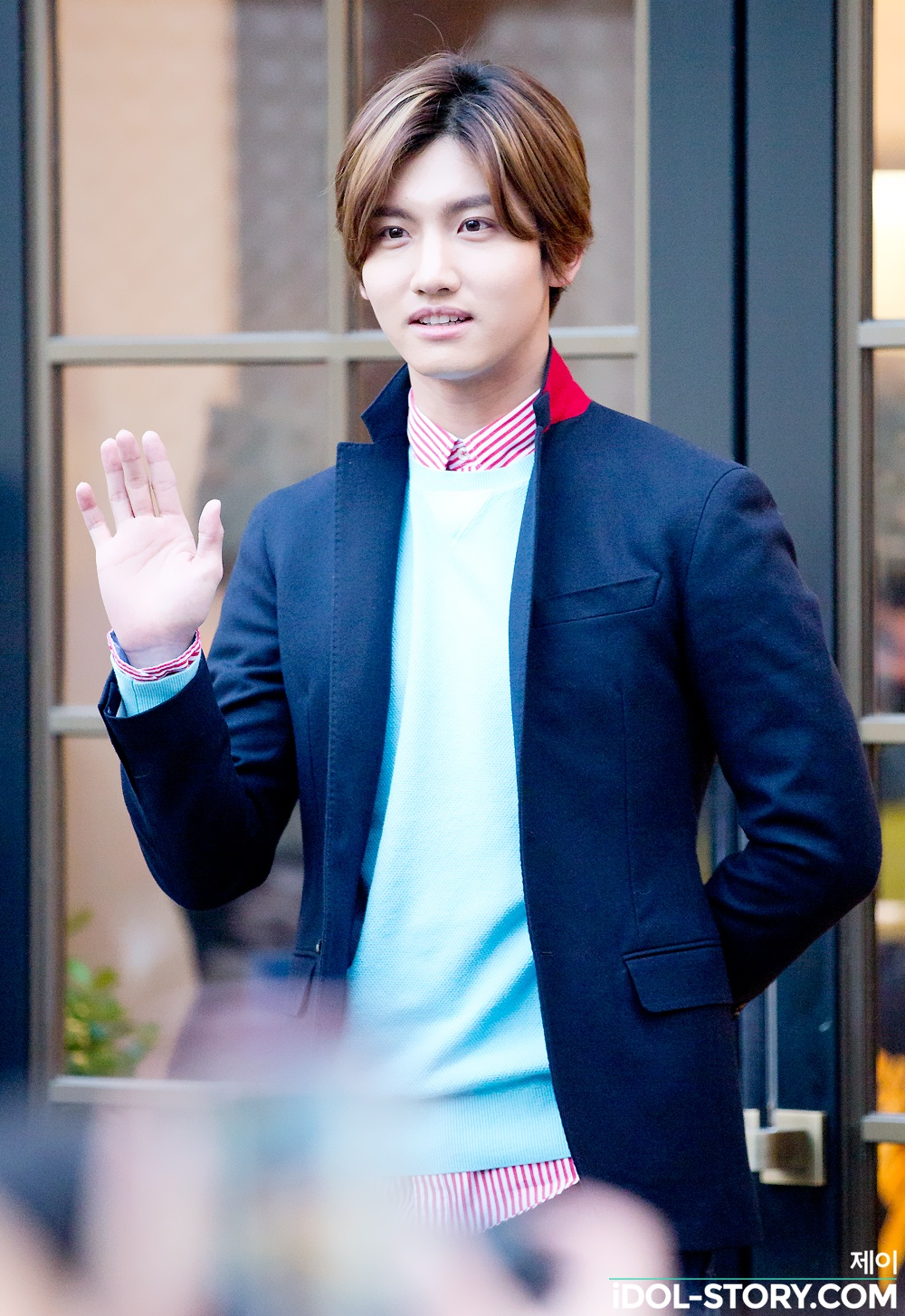 140123 타미힐 피거 플래그쉽 스토어-최강창민